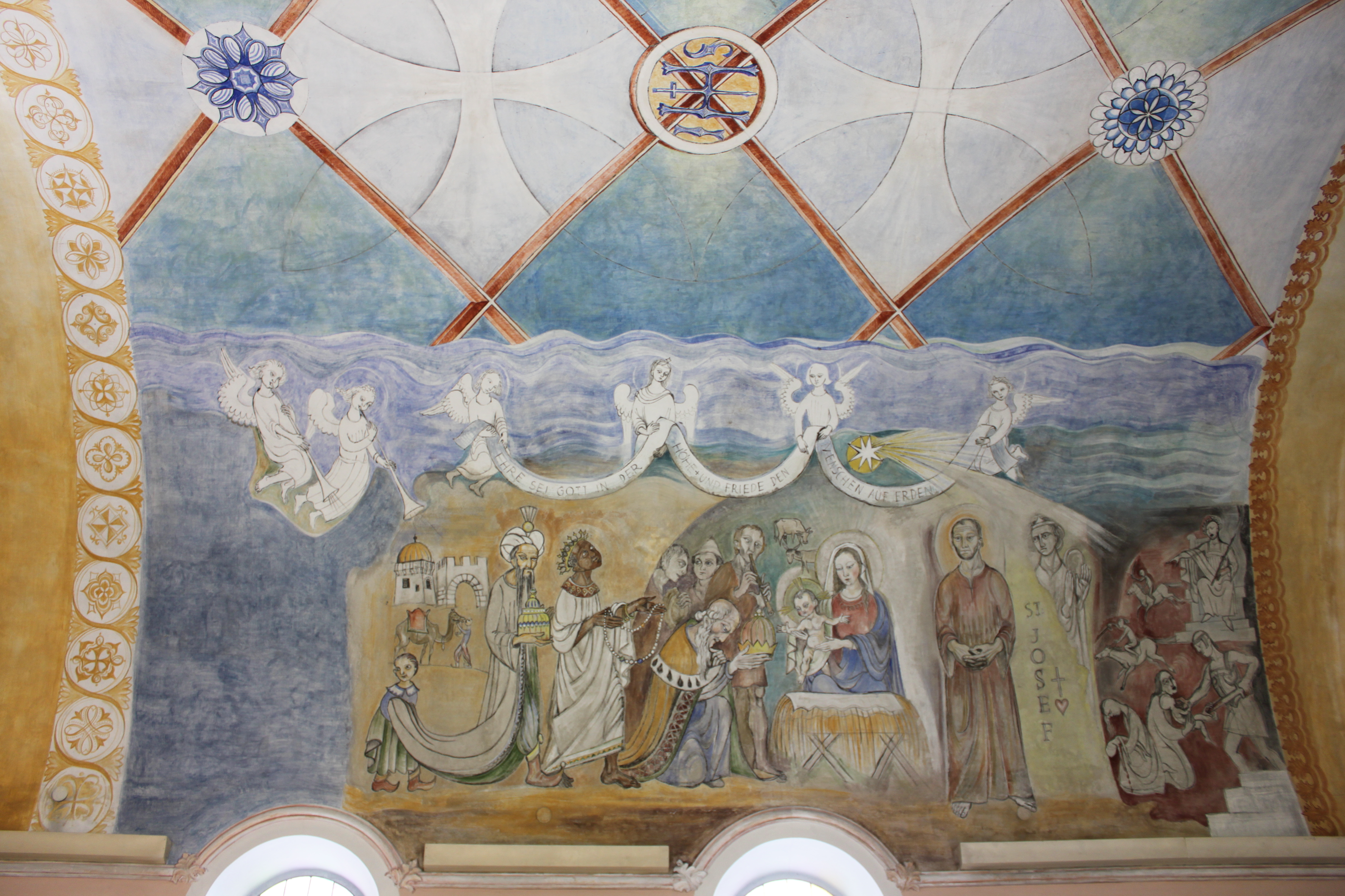 Kapelle zum hl. Joseph in Untergurgl, Abbetung der Hll. Drei Könige mit Nennung des Patroziniums St. Josef, Künstler Karl Obleitner jun, laut Dehio